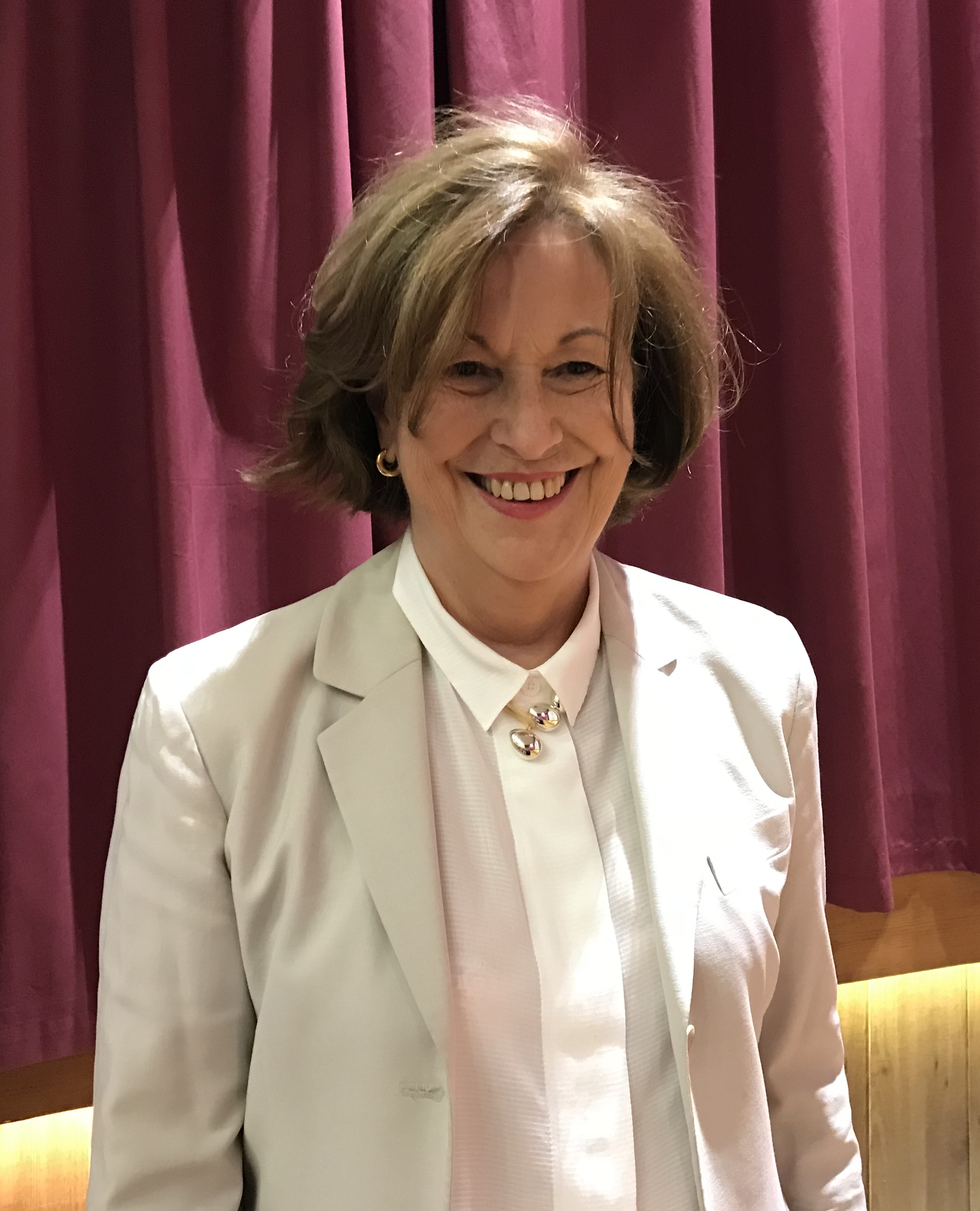 Carmen Romero en la entrega de los Premios Mujeres Progresistas 2017